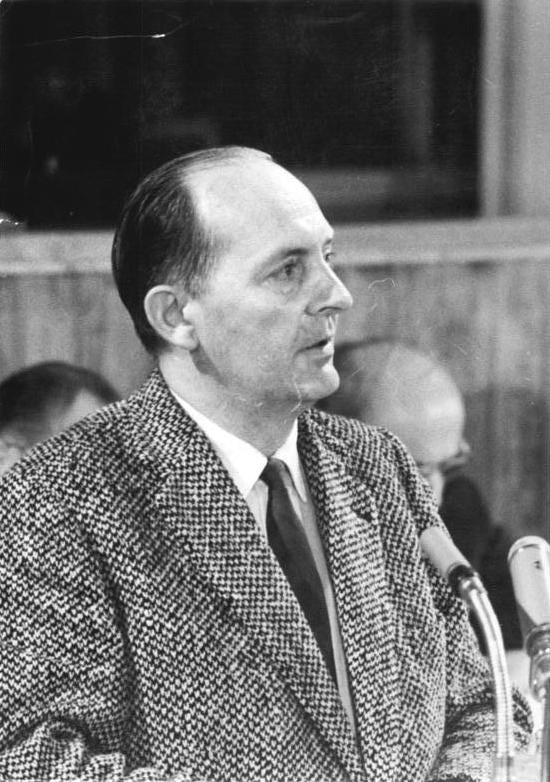 Zentralbild/Sturm 4.10.1960 15. Sitzung der Volkskammer der DDR Im In- und Ausland mit größtem Interesse erwartet ist die Volkskammer der Deutschen Demokratischen Republik am 4.10.1960 um 11.00 Uhr zu ihrer 15. Sitzung zusammengetreten. Auf der Tagesordnung stehen eine Erklärung des Staatsrates der Republik, das "Gesetz über die Anpassung von gesetzlichen Bestimmungen an die Bildung des Staatsrates der Deutschen Demokratischen Republik" in erster und zweiter Lesung sowie Anzeigen des Ausschusses für Eingaben der Bürger. UBz.: Ein leidenschaftliches Bekenntnis zum sozialistischen Aufbau in der DDR legte Prof. Dr. Robert Havemann als Sprecher der Kulturbund-Fraktion ab.